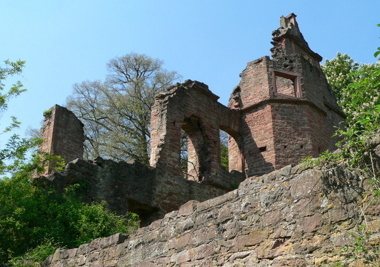 Die Ruine Collenburg oberhalb von Collenberg am Main, Germany